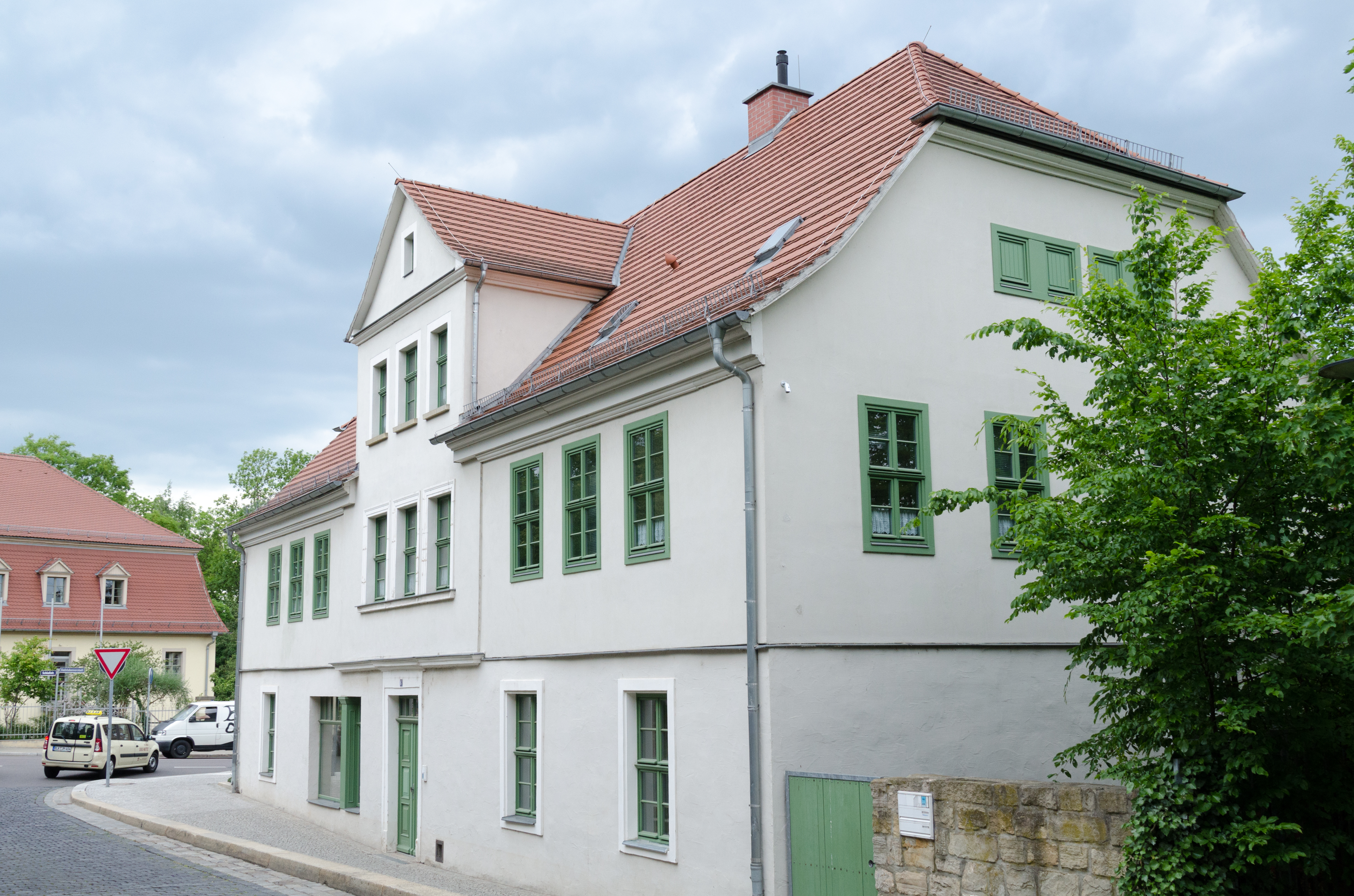 Zeitz, Nicolaistraße 6